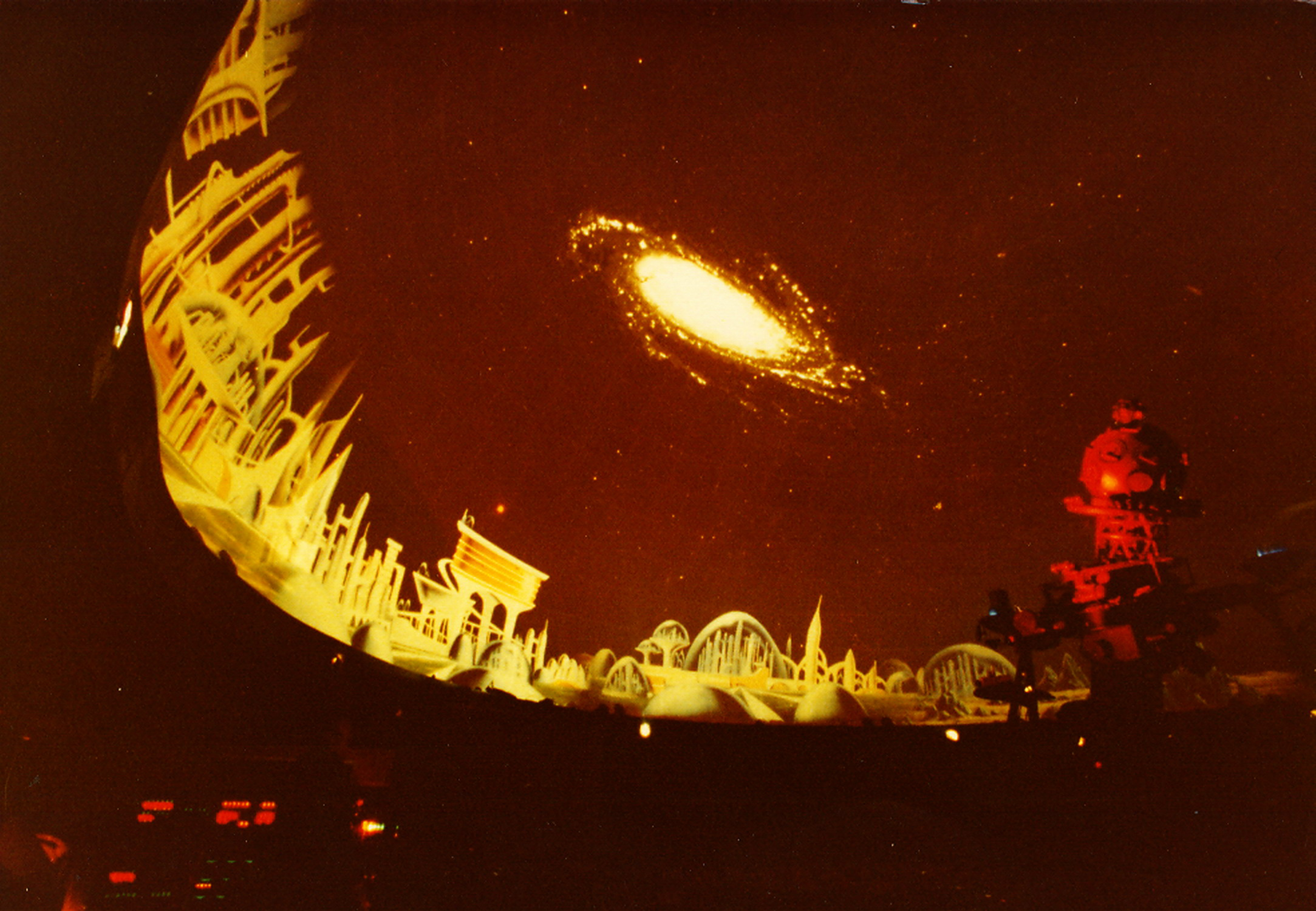 Ĉe la Planetario Euginides